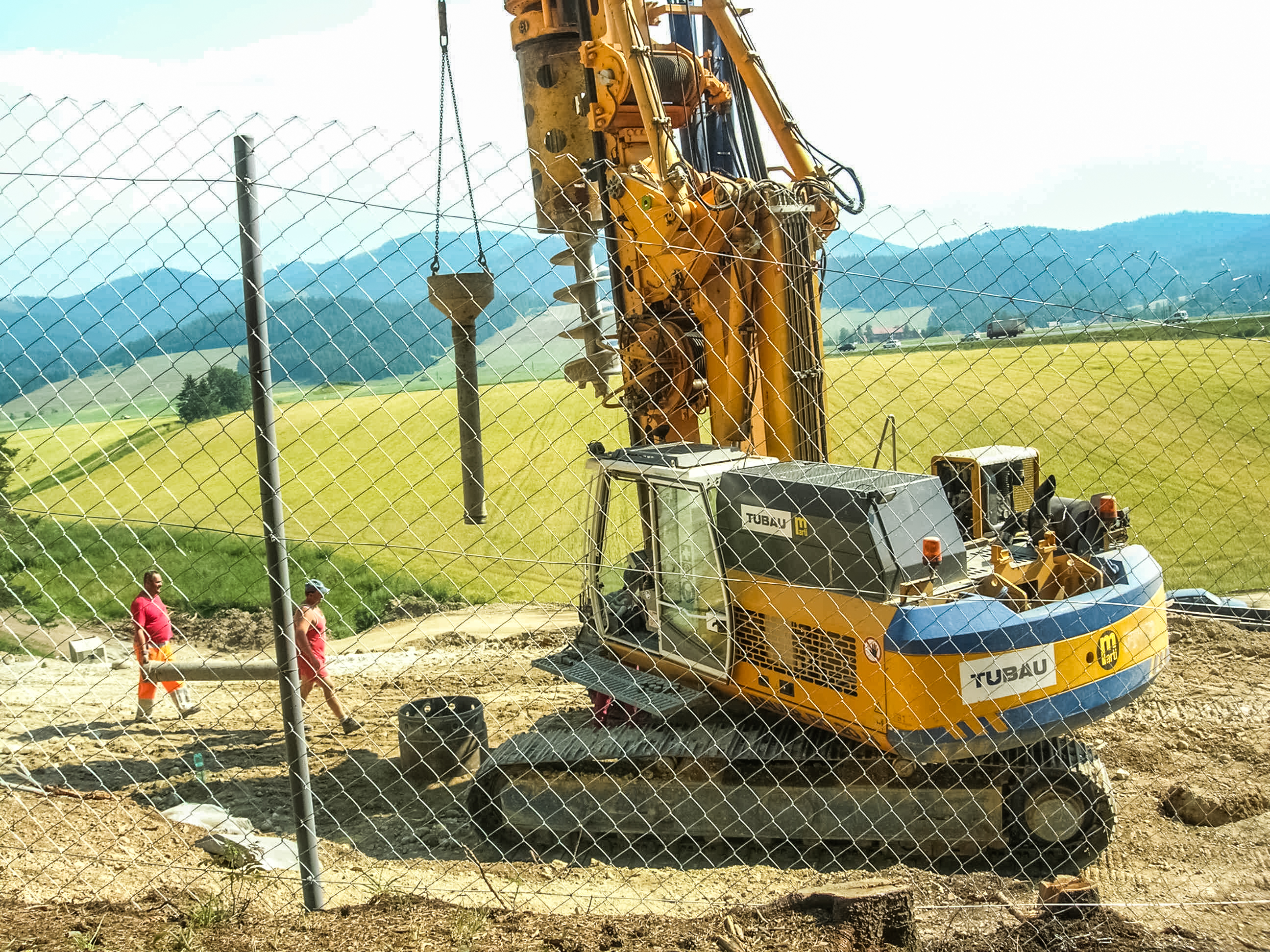 Vrtná súprava Bauer BG 20 H, počas razenia tunela Bôrik zo dňa 21. júla 2006.